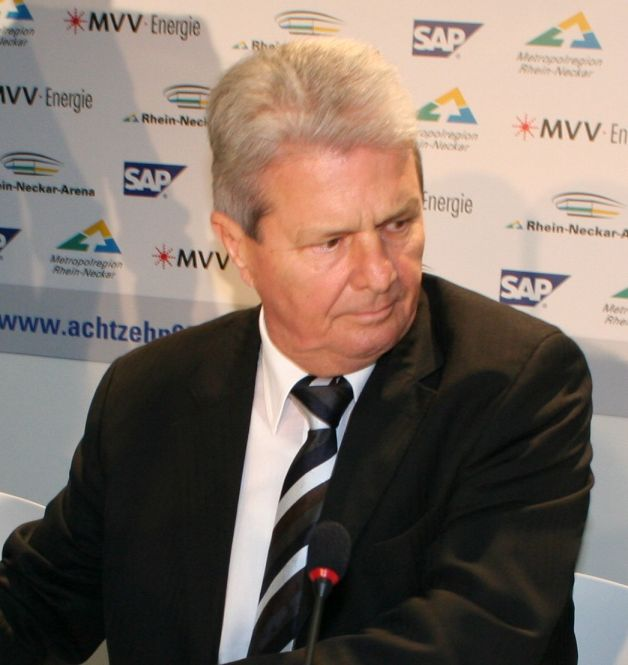 Dietmar Hopp bei der Eröffnung der Rhein-Neckar-Arena